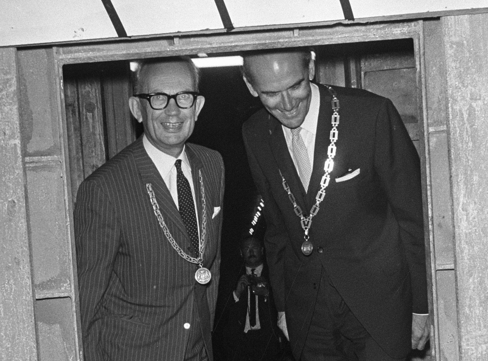 De burgemeesters Groeneweg van Heinenoord (links) en Hofwege van Barendrecht poseren gezamenlijk